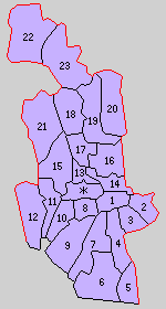 佐賀県佐賀郡の町村制時点の町村。